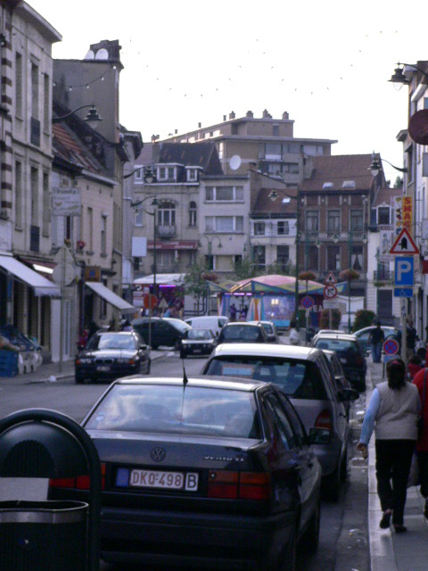 Auteur Poulsen, cette photo représente la chaussée de Gand Molenbeek Shopping Center - Photo libre de tous drois...cédées à la Wikimedia Foundation